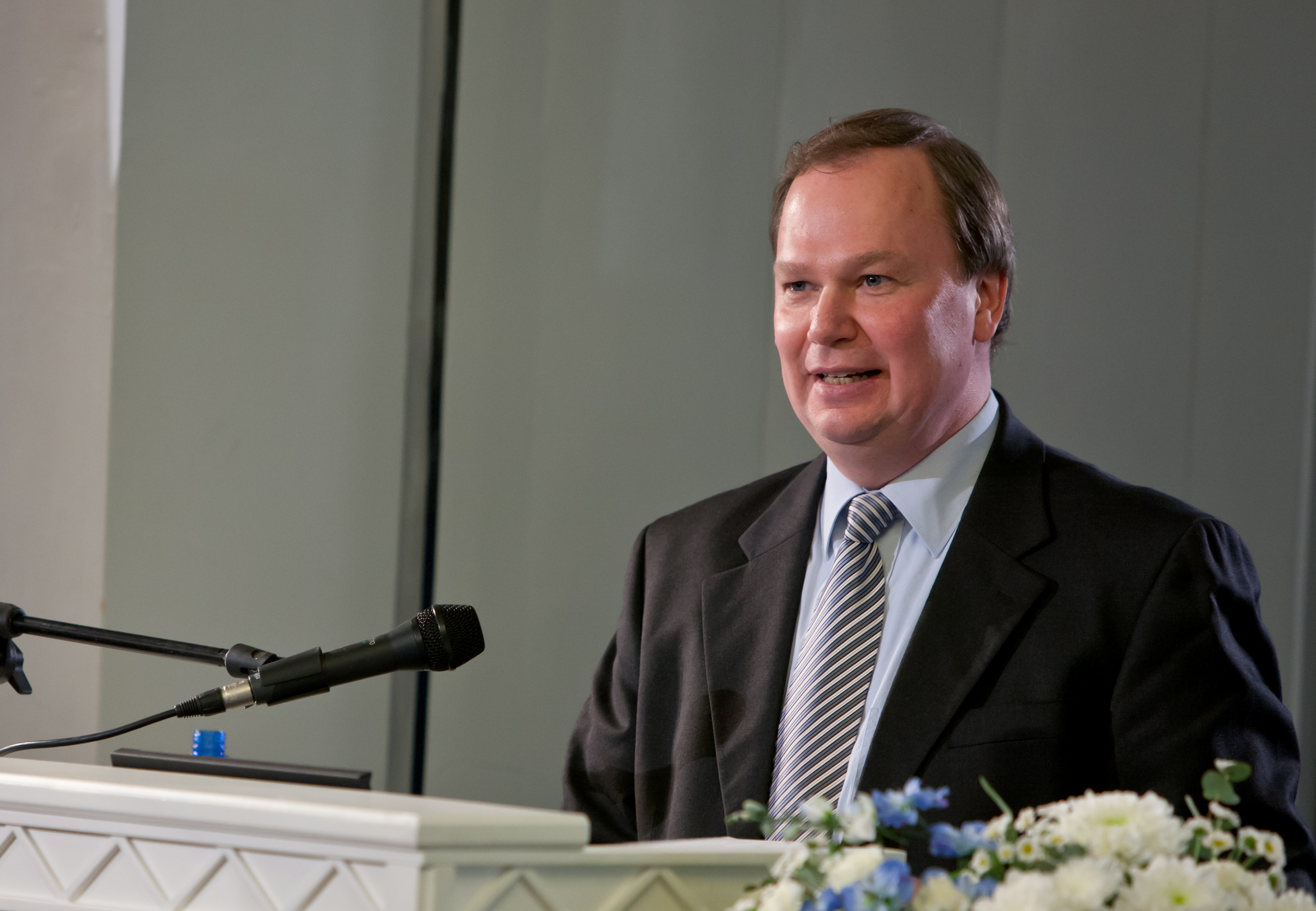 Professor Karl Pajusalu rääkimas 5. novembril 2011 TÜ ajaloo muuseumis toimunud konverentsil "Liivlased. Maa. Rahvas. Ajalugu".